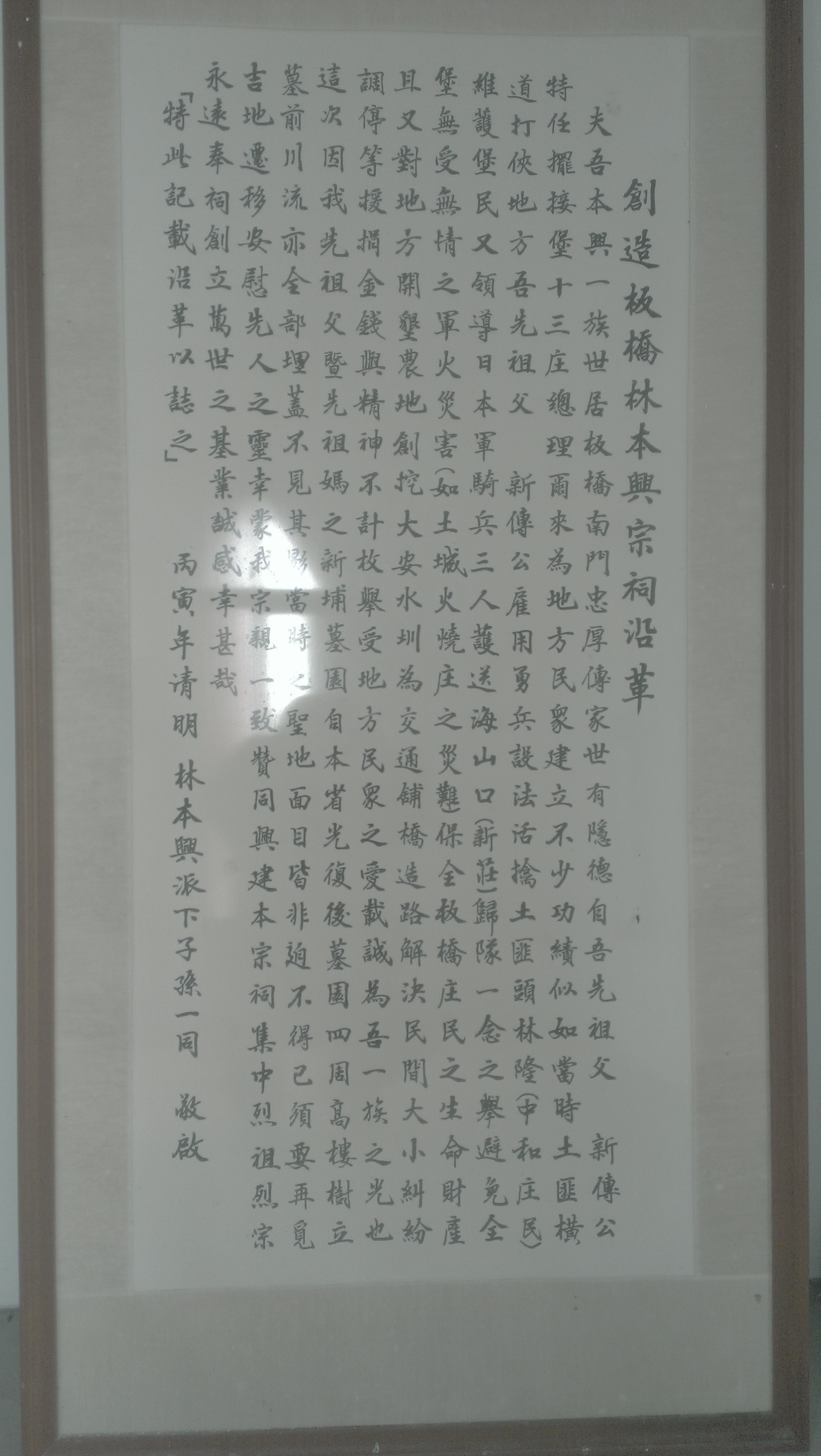 中文（台灣）: 板橋林本興一族沿革